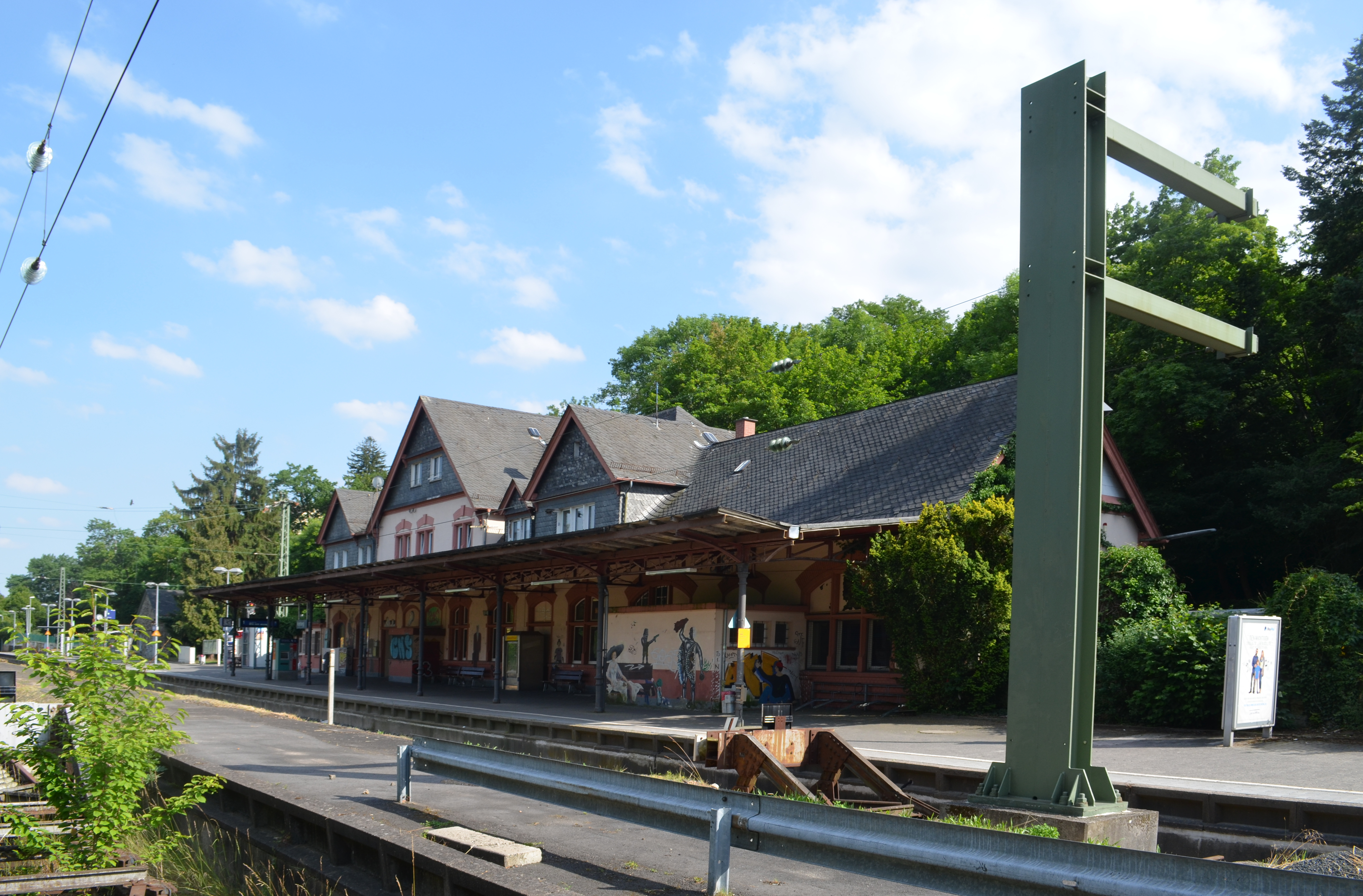 Kronberg, Bahnhofsempfangsgebäude